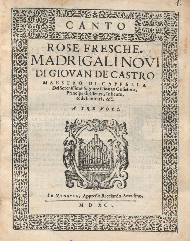 Title page of Jean de Castro Rose fresche, 1591